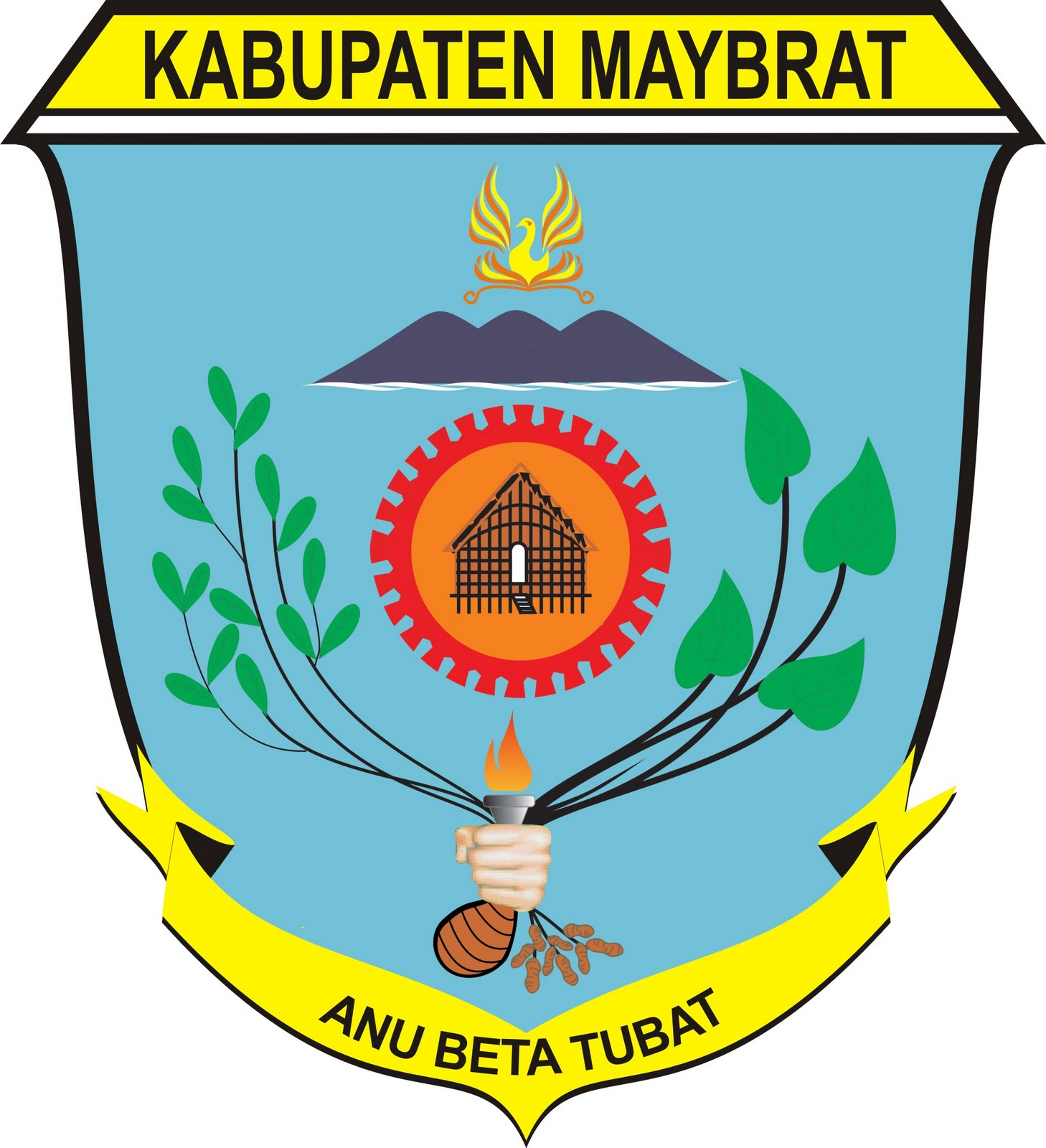 Merupakan lambang Kabupaten Tambrauw, Provinsi Papua Barat, Indonesia.